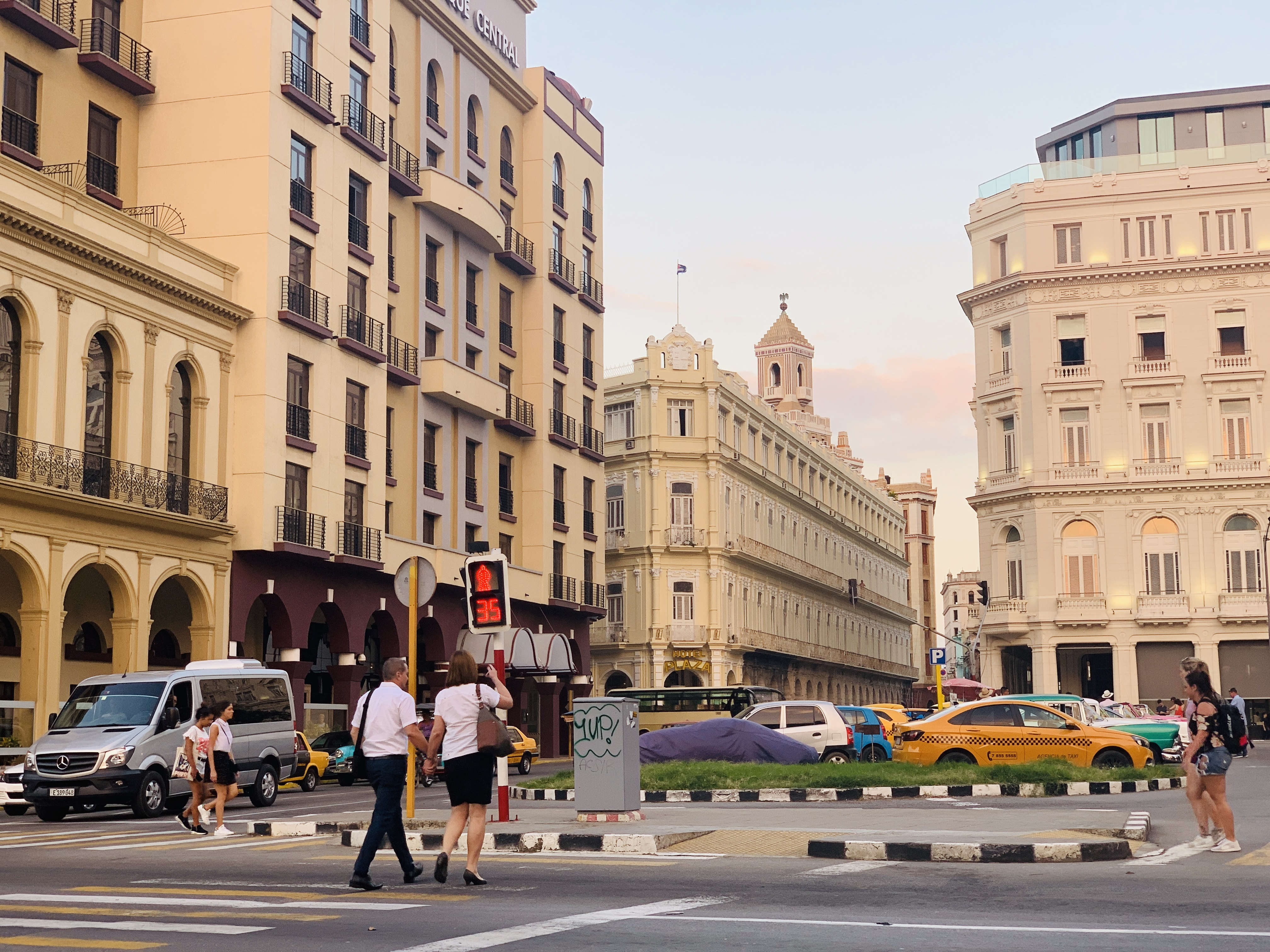 Edificios en La Habana Cuba